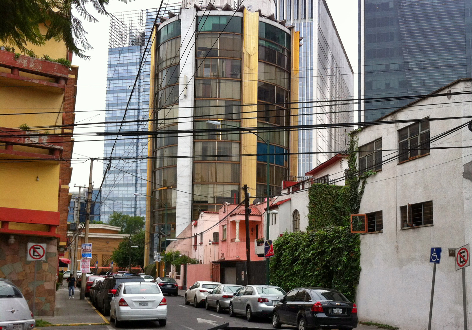 Casas originales estilo colonial californiano (derecha), edificios de departamentos (izquierda) y rascacielos de vidrio en la avenida Insurgentes Sur (fondo) han poblado la colonia Del Valle en ese orden. Cambiando radicalmente el entorno y alterando el uso de suelo.